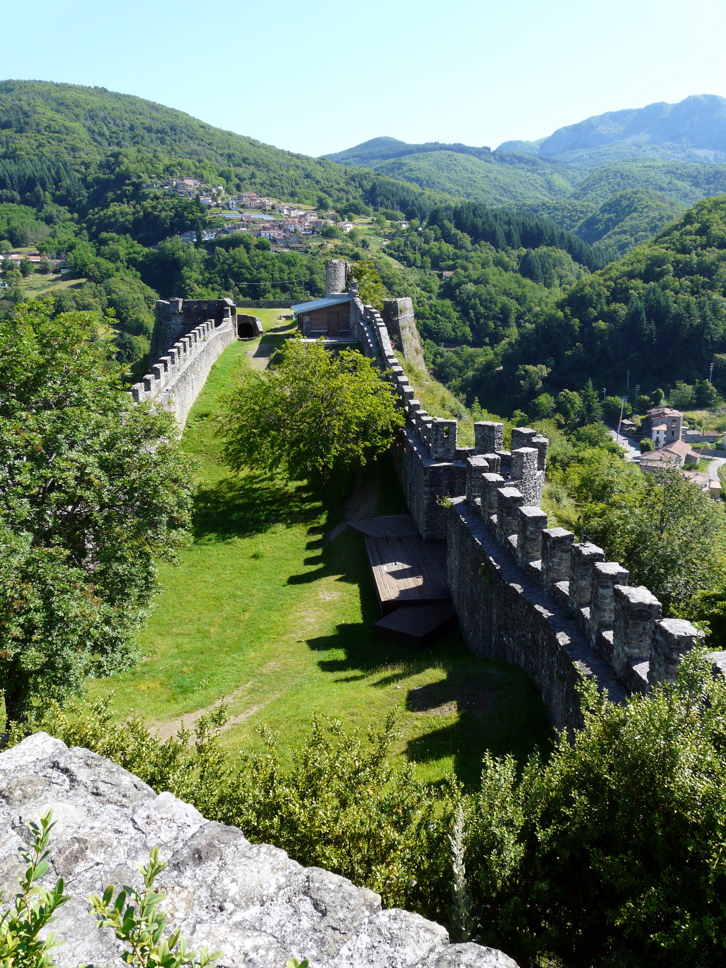 Serie di immagini della fortezza delle Verrucole, San Romano in Garfagnana, Toscana, Italia